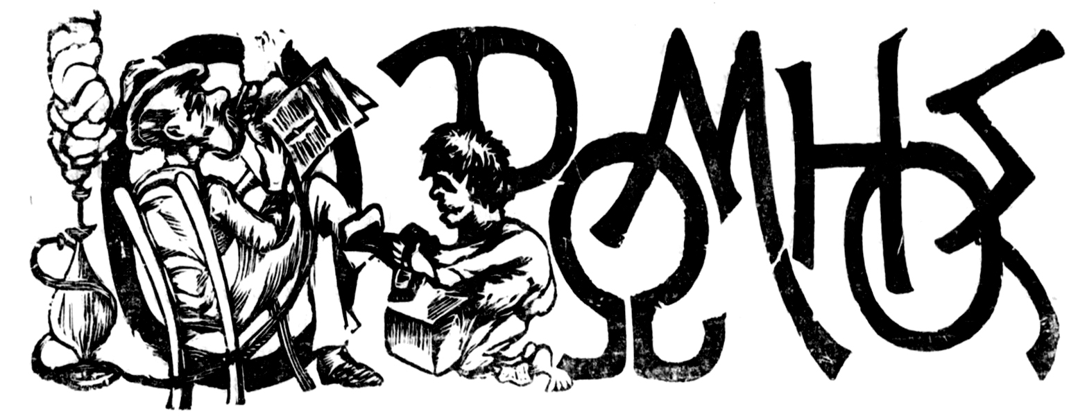 Το λογότυπο του Ρωμηού από το πρώτο τεύχος